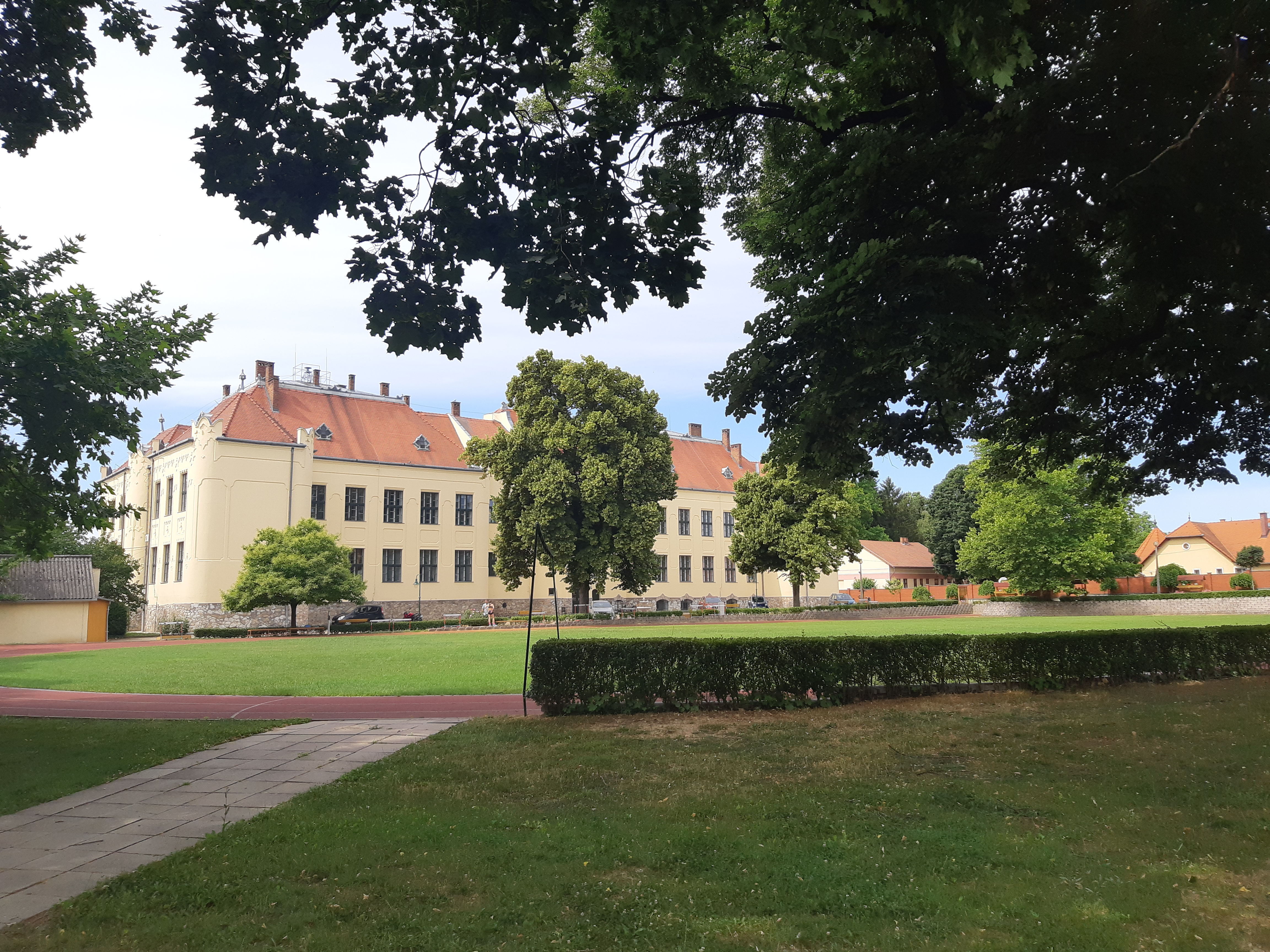 A Bonyhádi Petőfi Sándor Evangélikus Gimnázium hátsó udvara a Forberger László futópályával. A szecessziós főépület felújított állapotban látható.